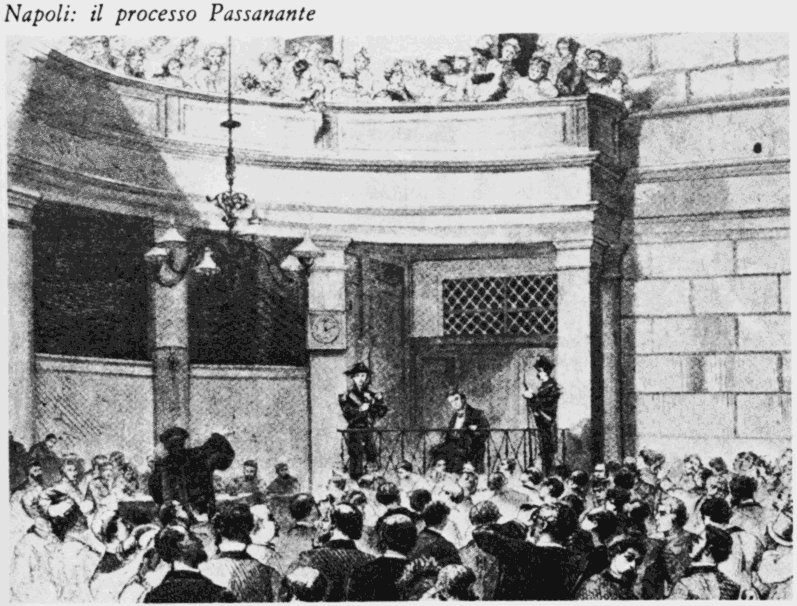 O Processo de Passannante, imagem de reconstituição publicada em jornal do século XIX.